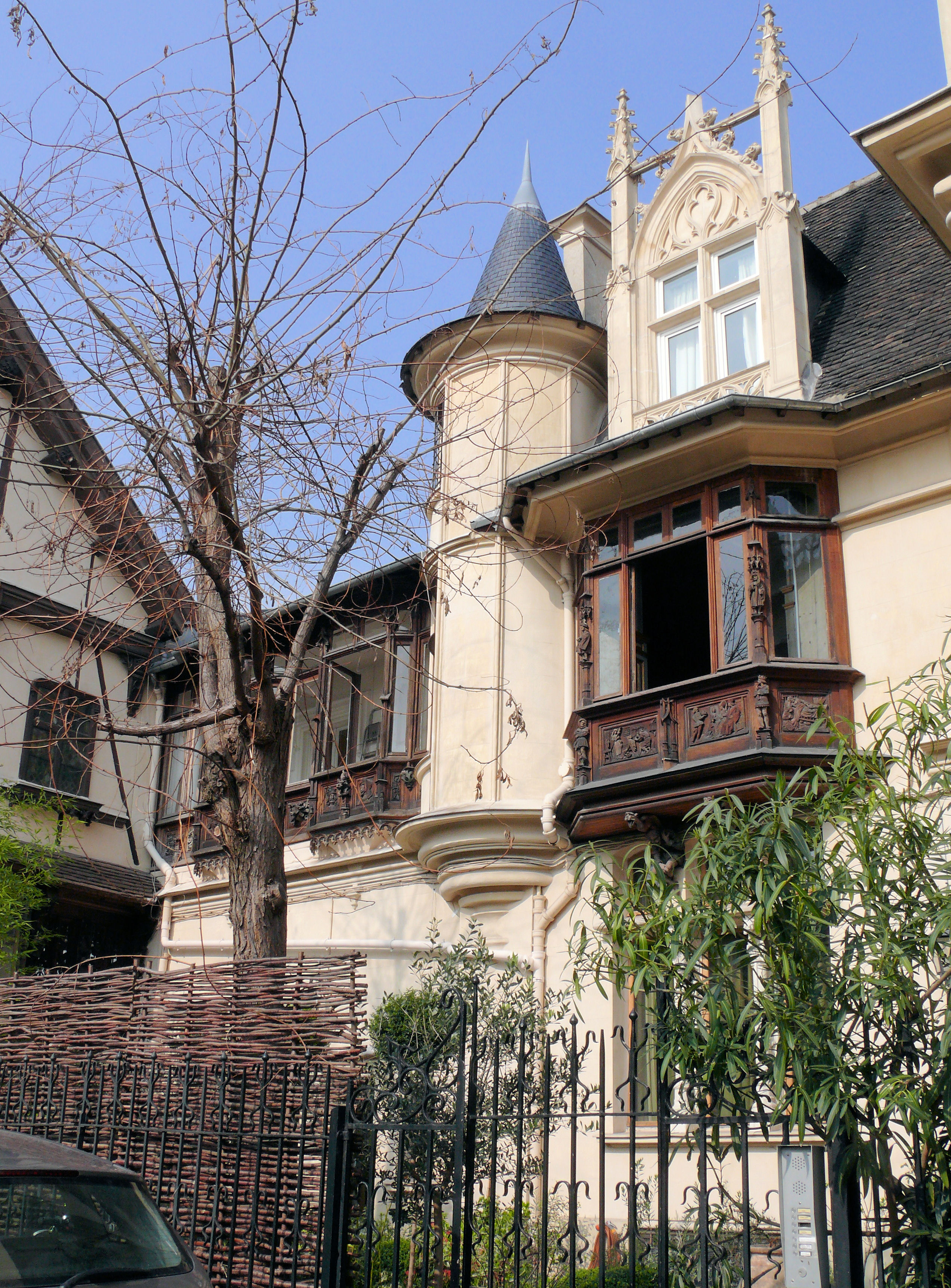 Paris 18e arrondissement - Maison Eymonaud - La partie de la maison comprise entre la tour et l'agrandissement vers l'ouest